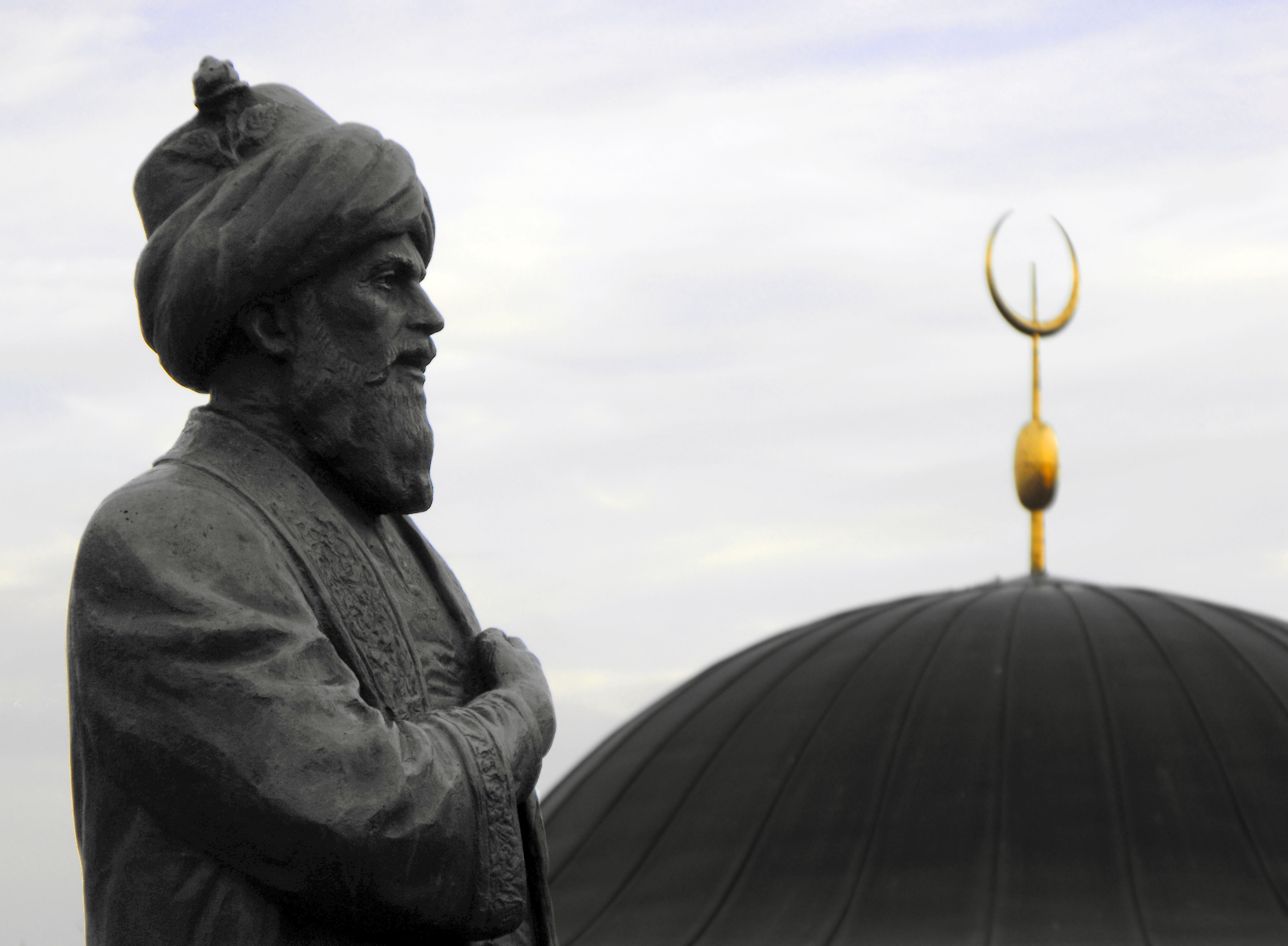 Gül Baba szobra háttérben a türbével, Budapest II. kerület This is a photo of a monument in Hungary. Identifier: 290